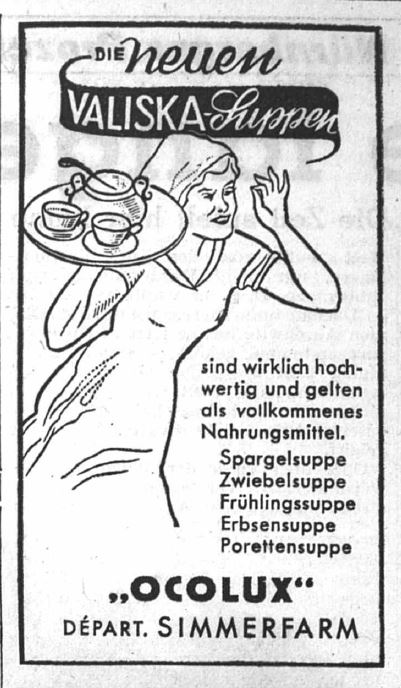 Reklamm fir d'Valiska-Zoppe vun der Simmerfarm am Luxemburger Wort vum 4. Abrëll 1946, Säit 3.